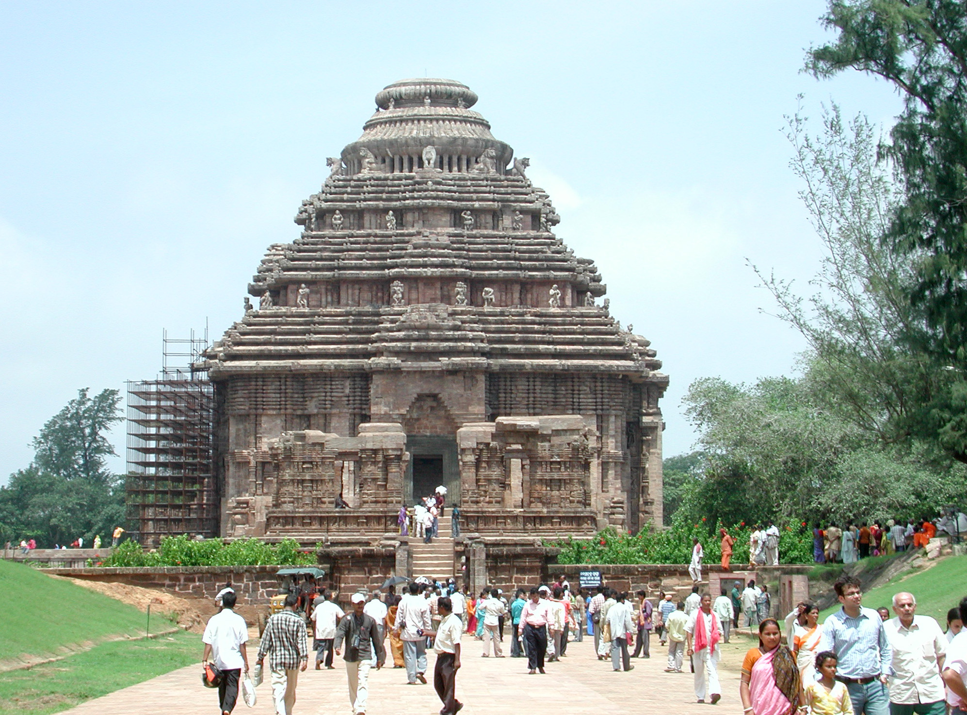 Sun Temple in Konark, Orissa, India.